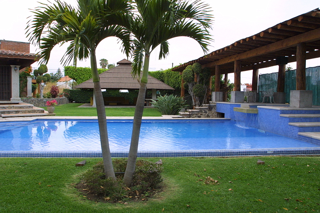 Residential Pool in Lomas de Cocoyoc, Mexico.